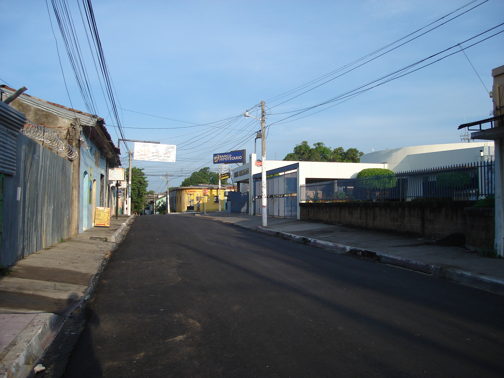 Zacatecoluca. Un agradable amanecer.